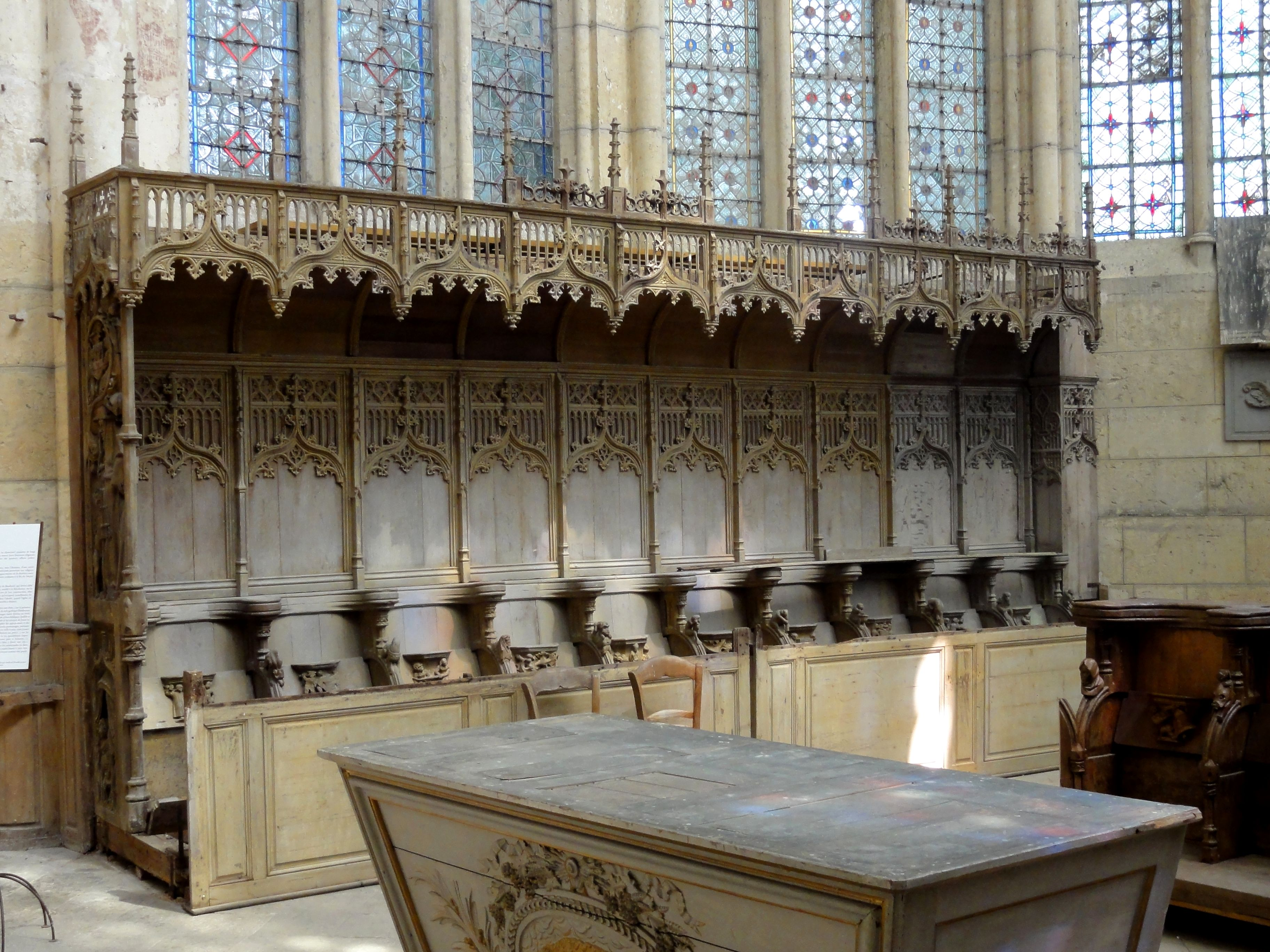 Les stalles de droite.